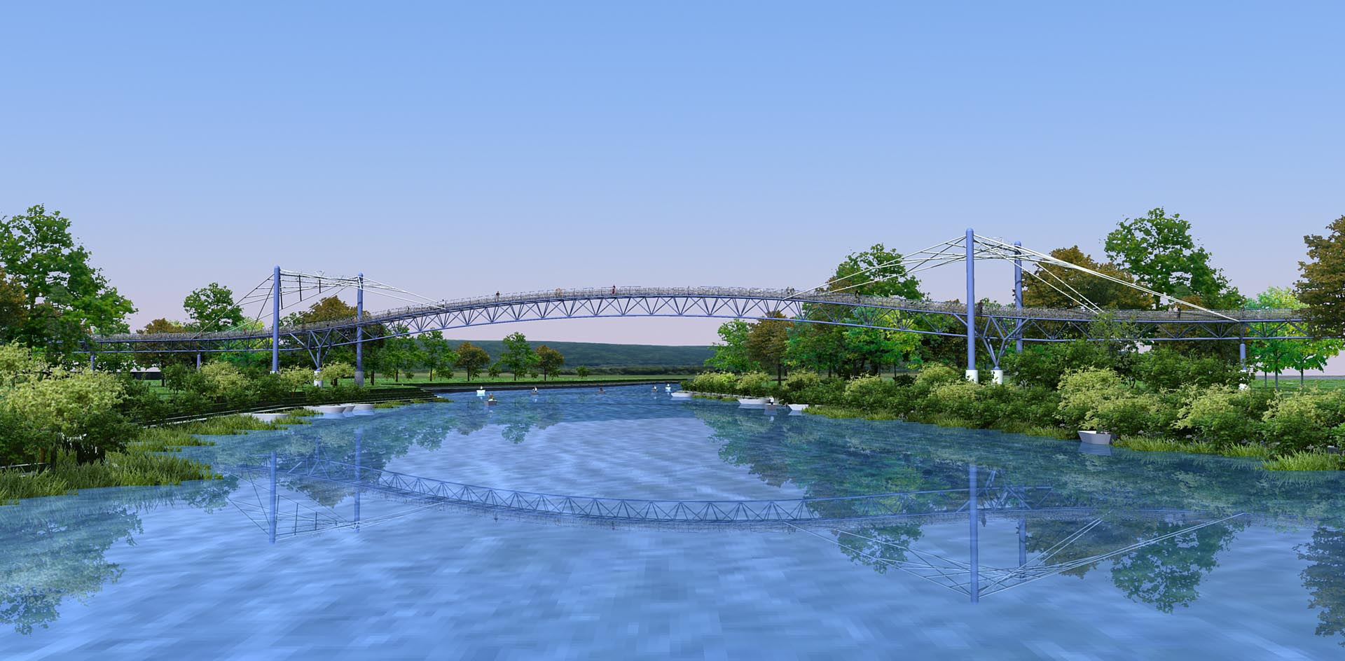 cyklomost - vizualizácia